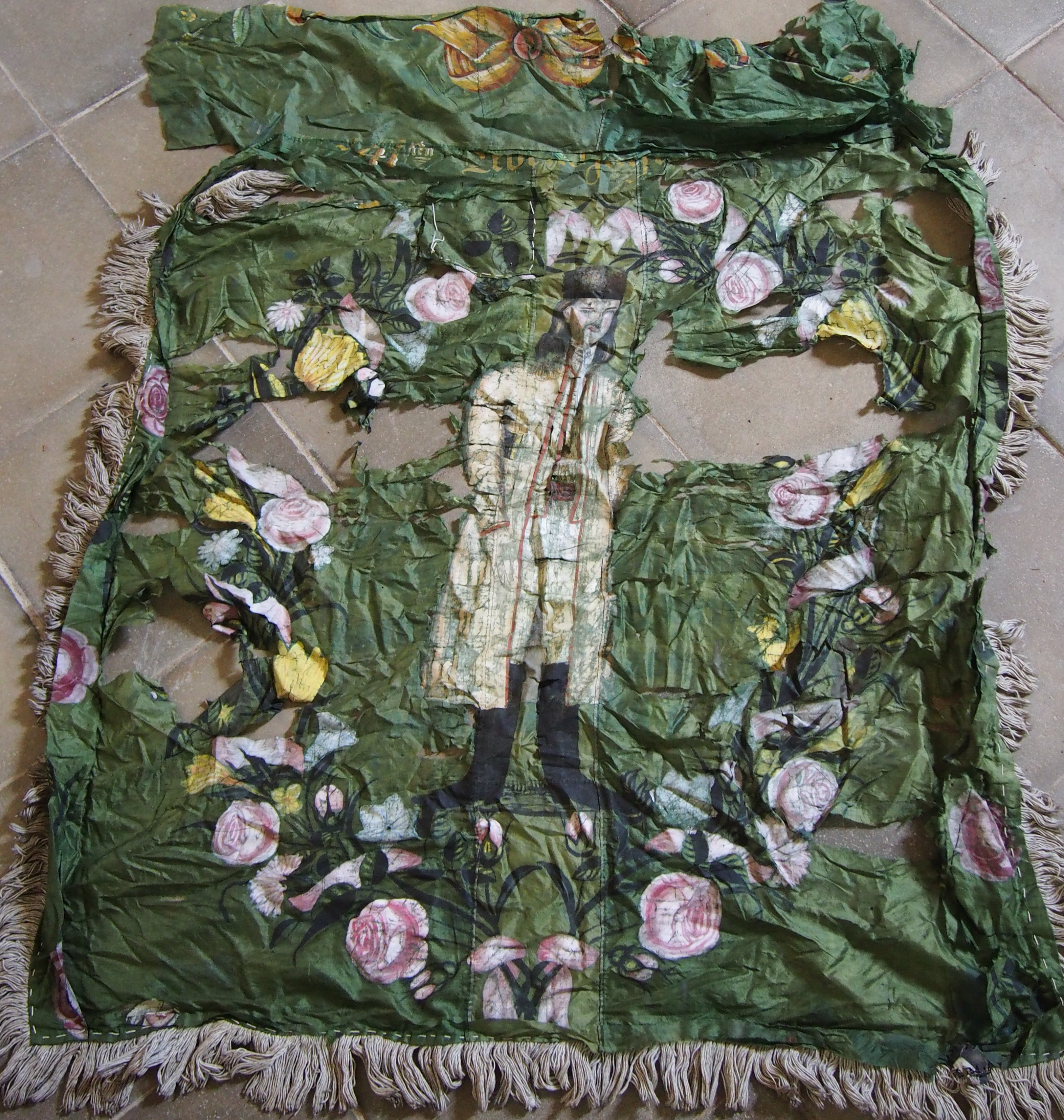 Die Fahne erinnert an die Teilnahme an dem Krieg zur Revolution von 1848 (Archiv Evangelische Kirche A.B. Girelsau)